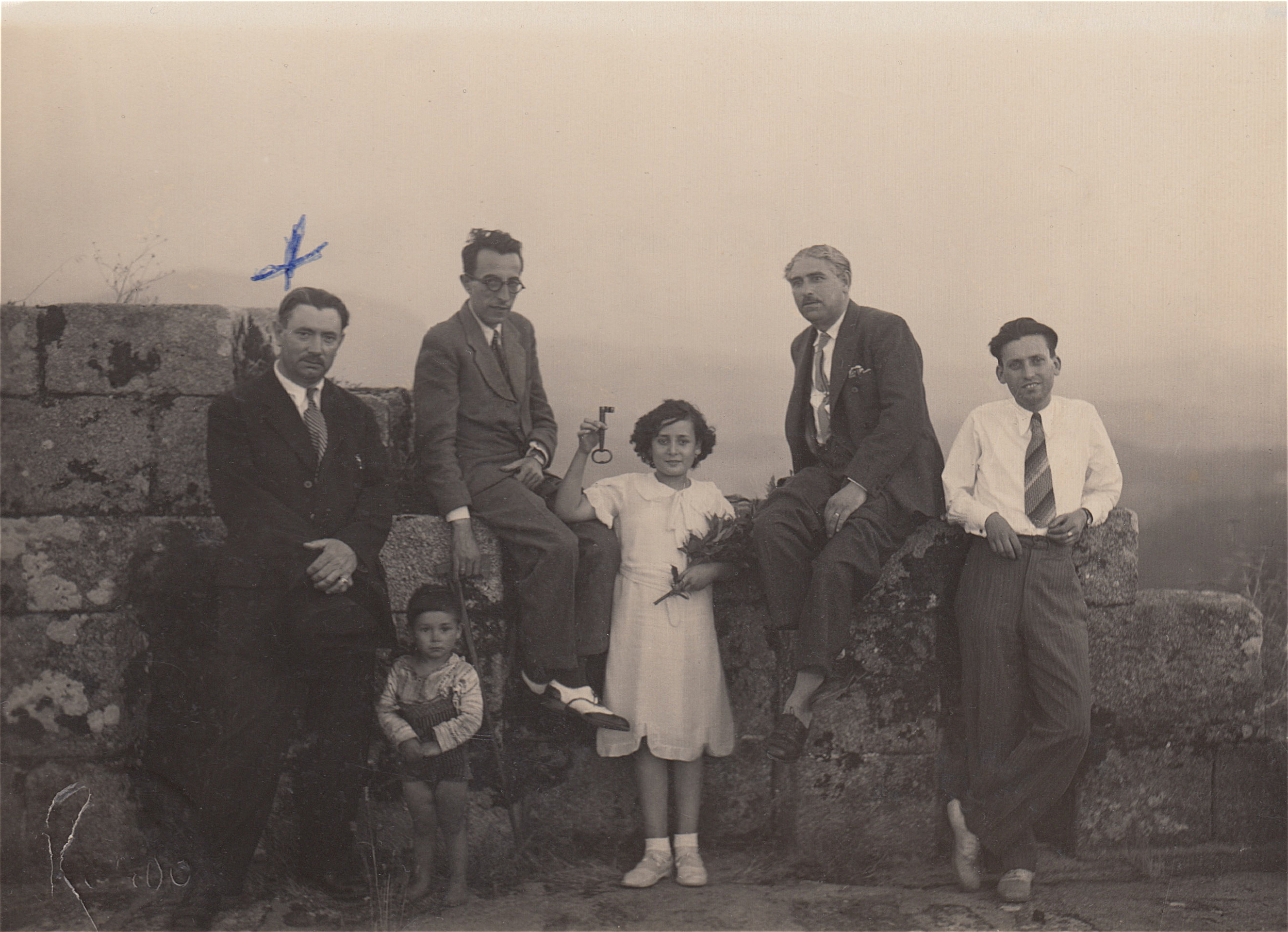 Castillo 1935 co poeta Julio Siguenza, Manuel Lamartin Vazquez, e Fernando Ruiz agosto 1935